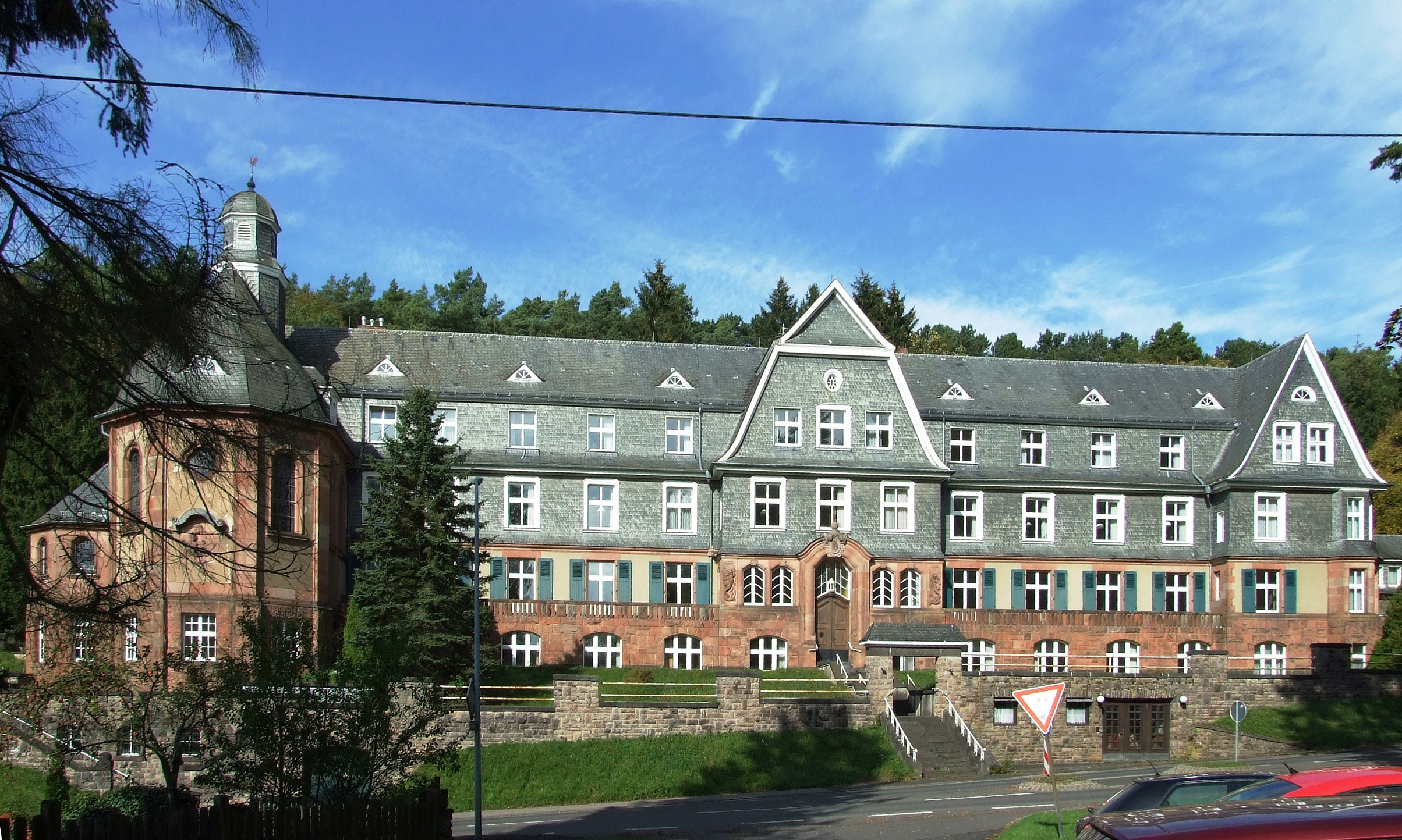 Nettersheim, Herz-Jesu-Kloster aus dem Parkweg aufgenommen